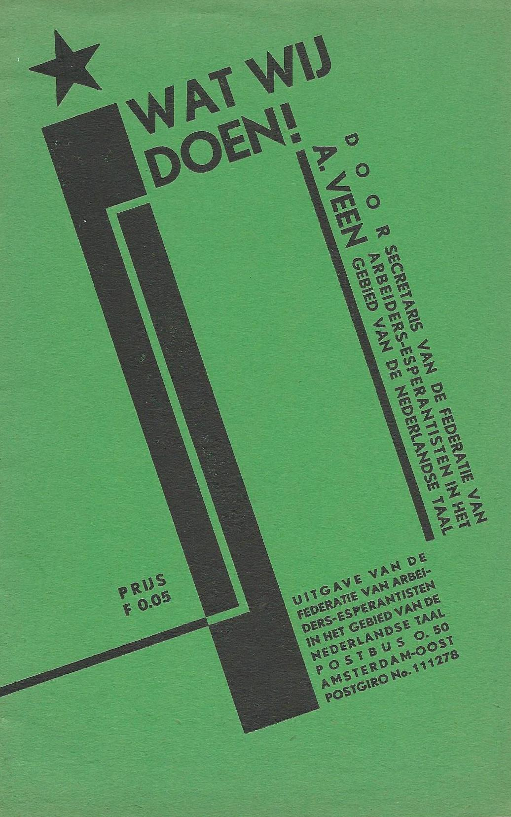 librokovrilo de "Wat Wij Doen!", 1937